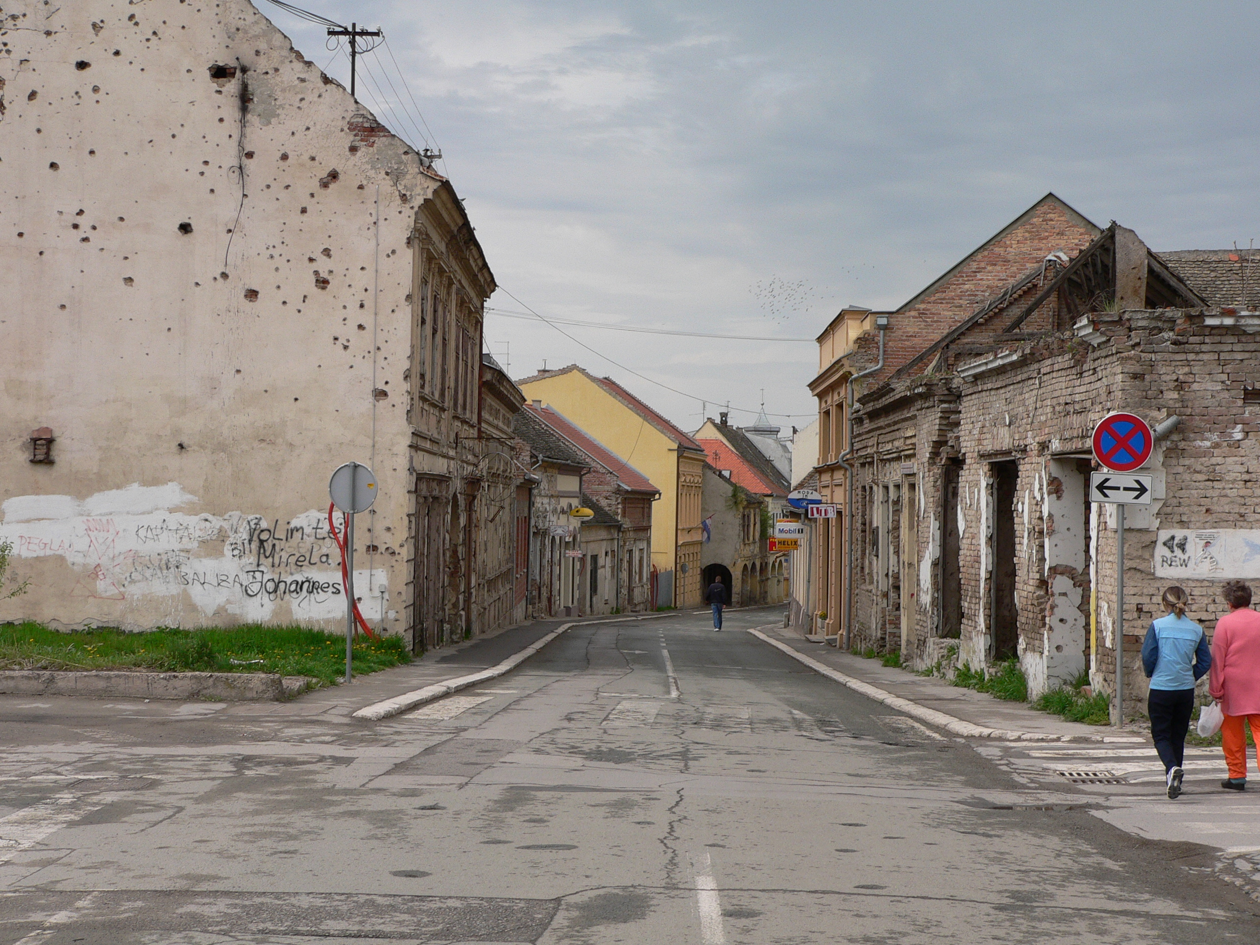 Main street, Vukovar